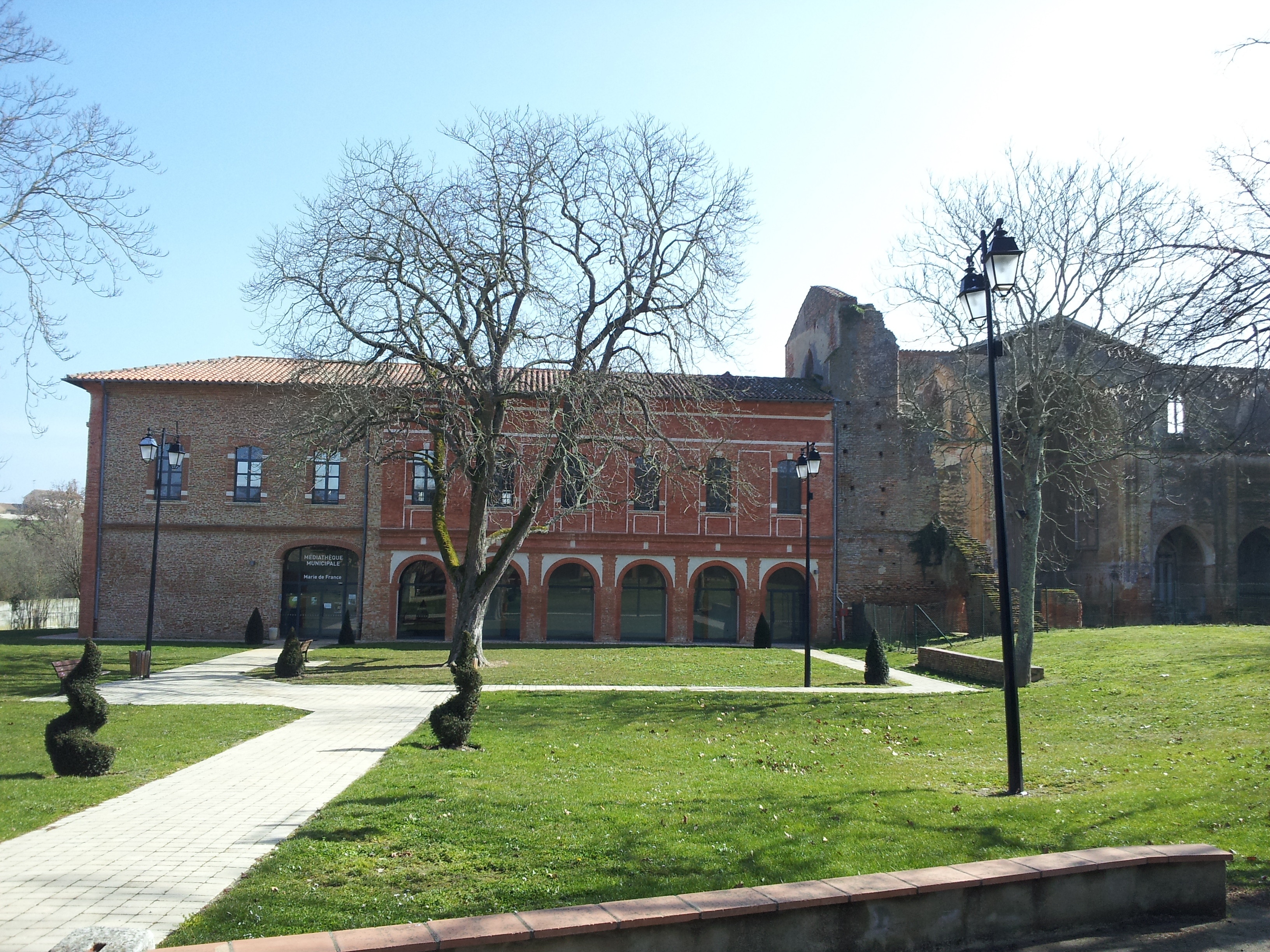 Abbaye La Clarté-Dieu (Eaunes) - médiathèque (dans le bâtiment conventuel)